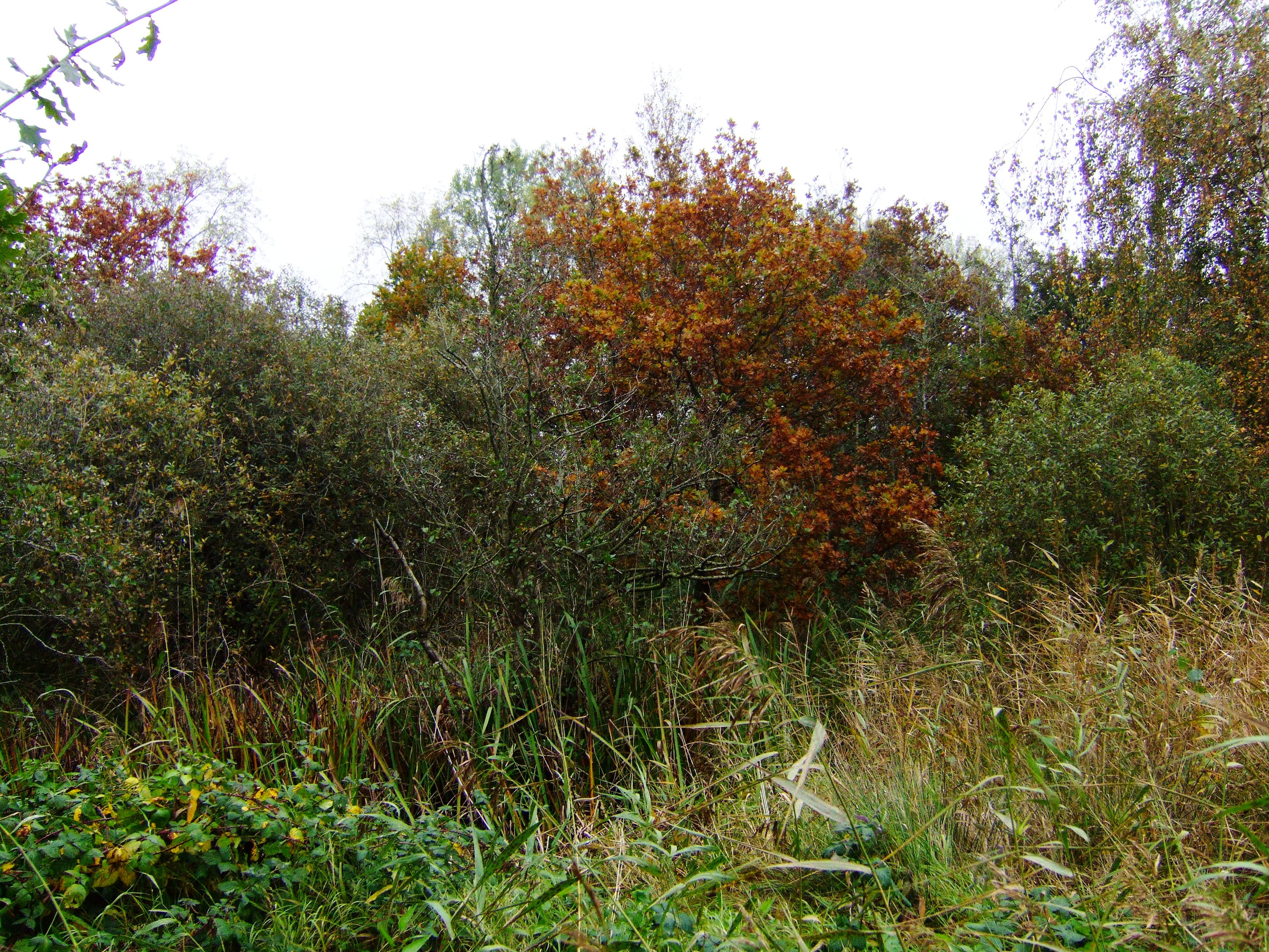 Ruig struweel in natuurgebied De Twigen.